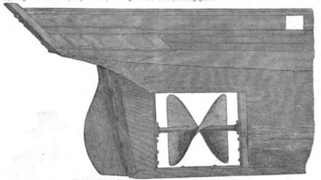 Archimedische Schraube des Dampfschiffes Archimedes.